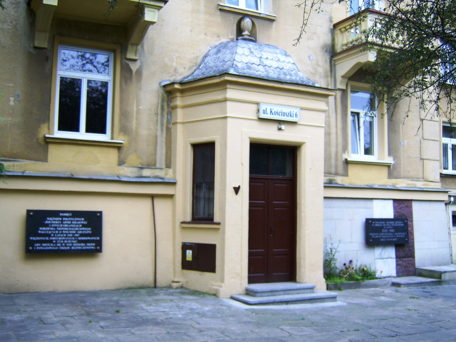 ulica Kościuszki, była siedziba Gestapo i NKWD